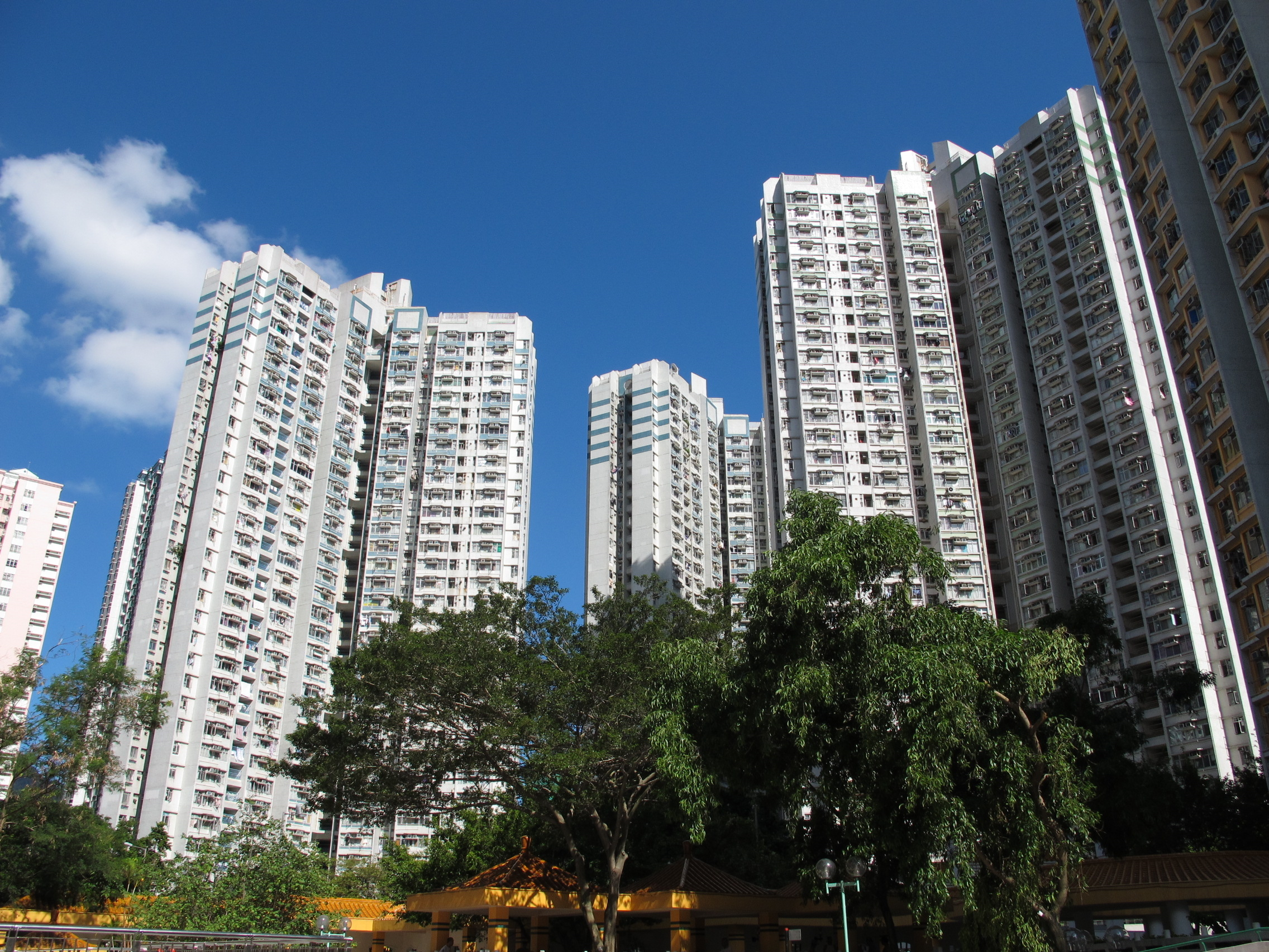 Lower Wong Tai Sin Estate